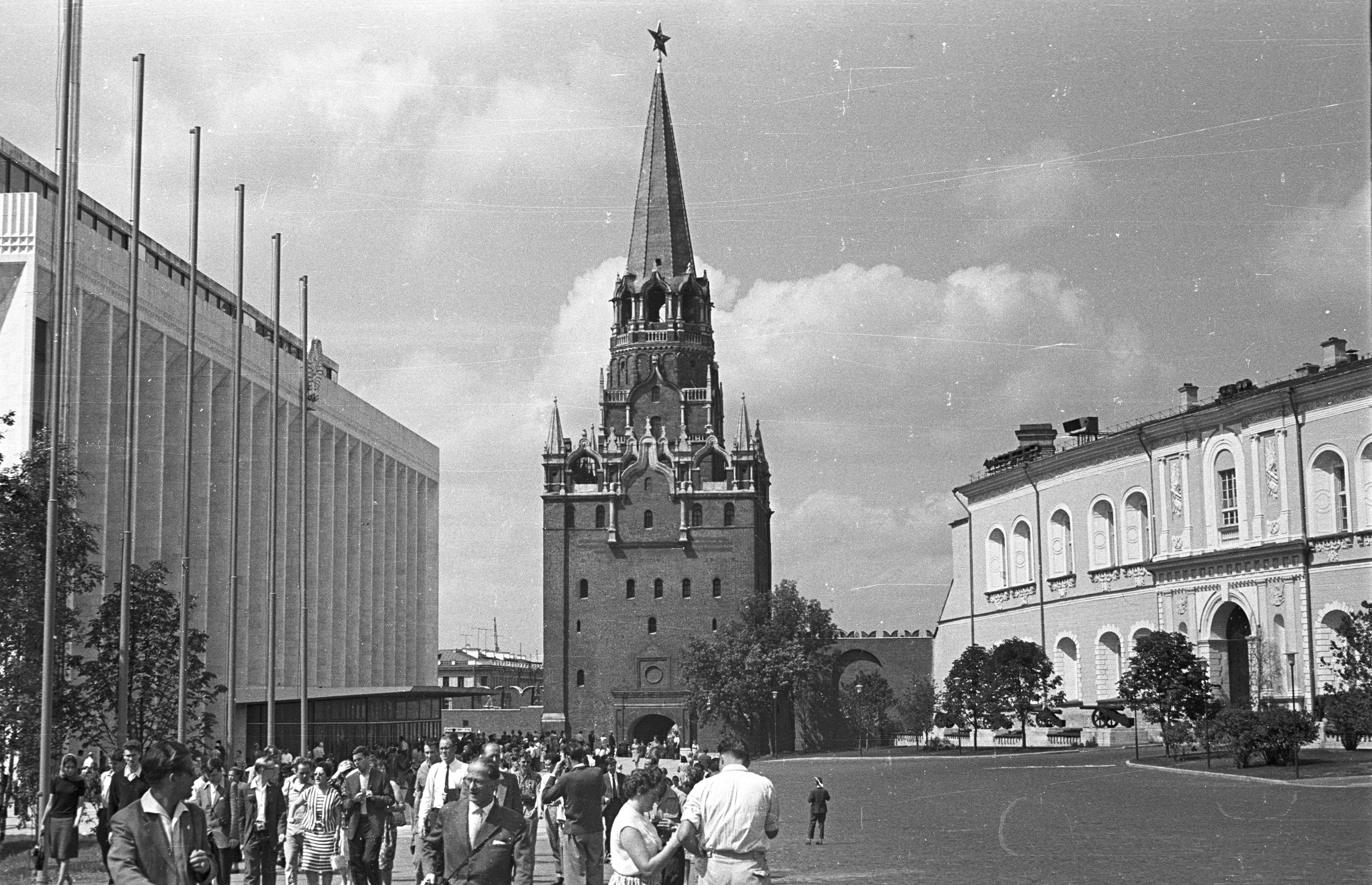 Kreml, balra a Kongresszusi-palota, jobbra a Szentháromság-torony. Location: Russia, Moscow Tags: Soviet Union Title: Kreml, balra a Kongresszusi-palota, jobbra a Szentháromság-torony.